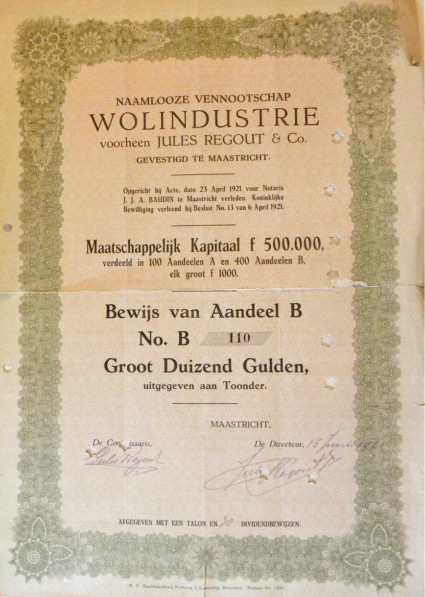 Aandeel van 1000 gulden uit 1921 van de wollen dekenfabriek Jules Regout & Co. in Maastricht.